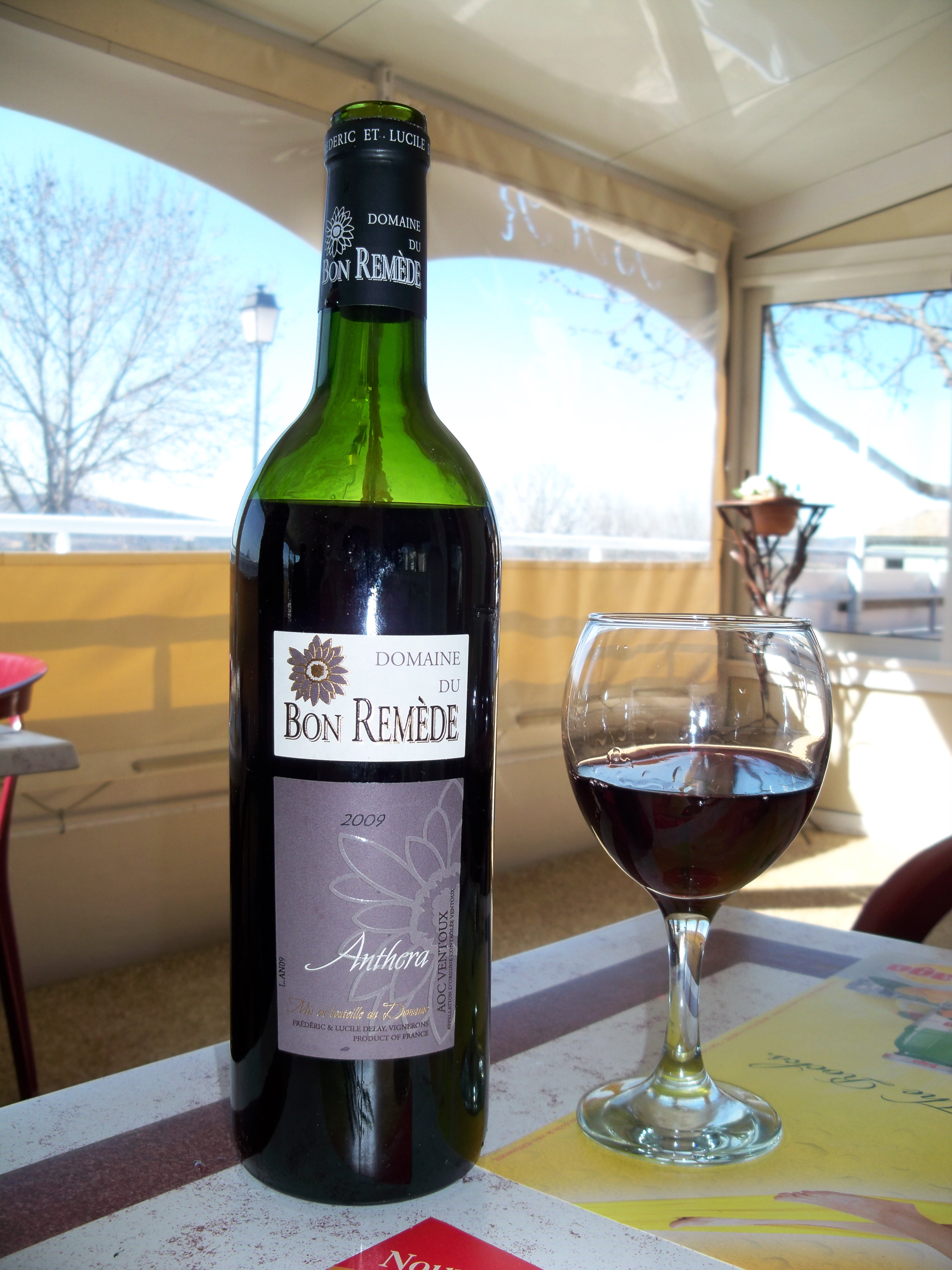 Bouteille de Bon Remède, AOC Ventoux de Mazan (84)